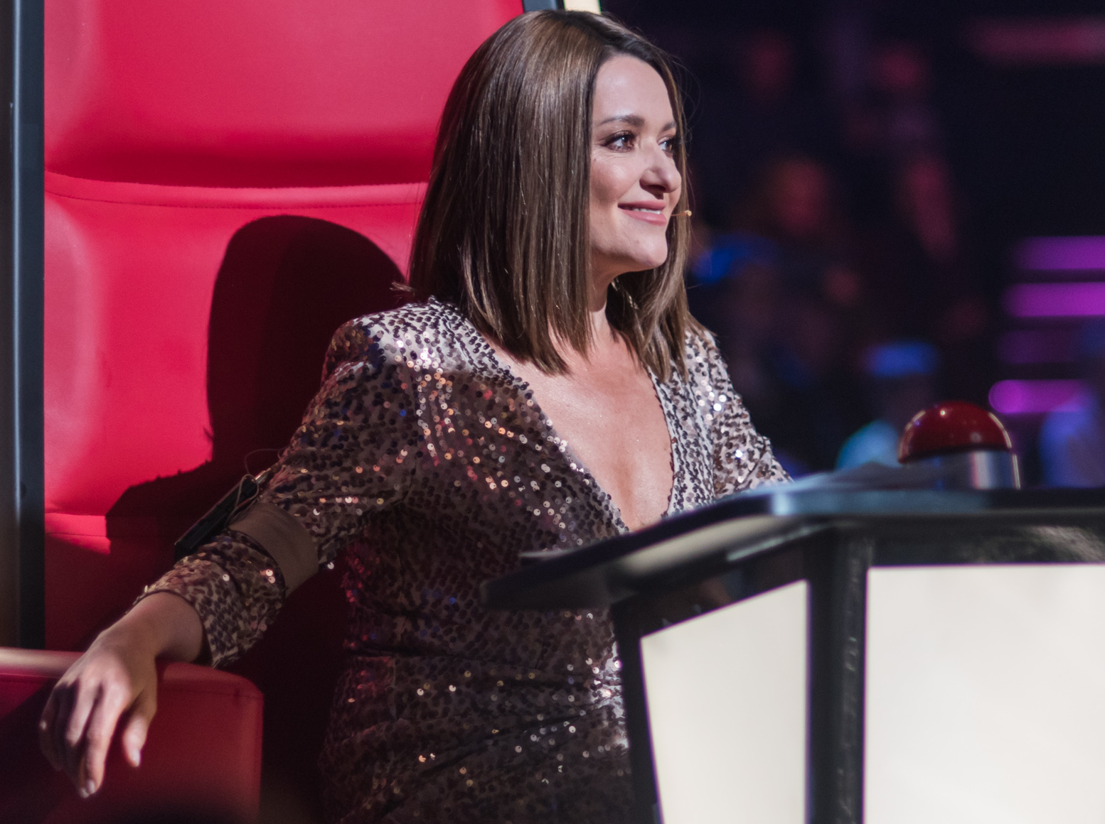 Финал Голос. Дiти 4. Наталья Могилевская